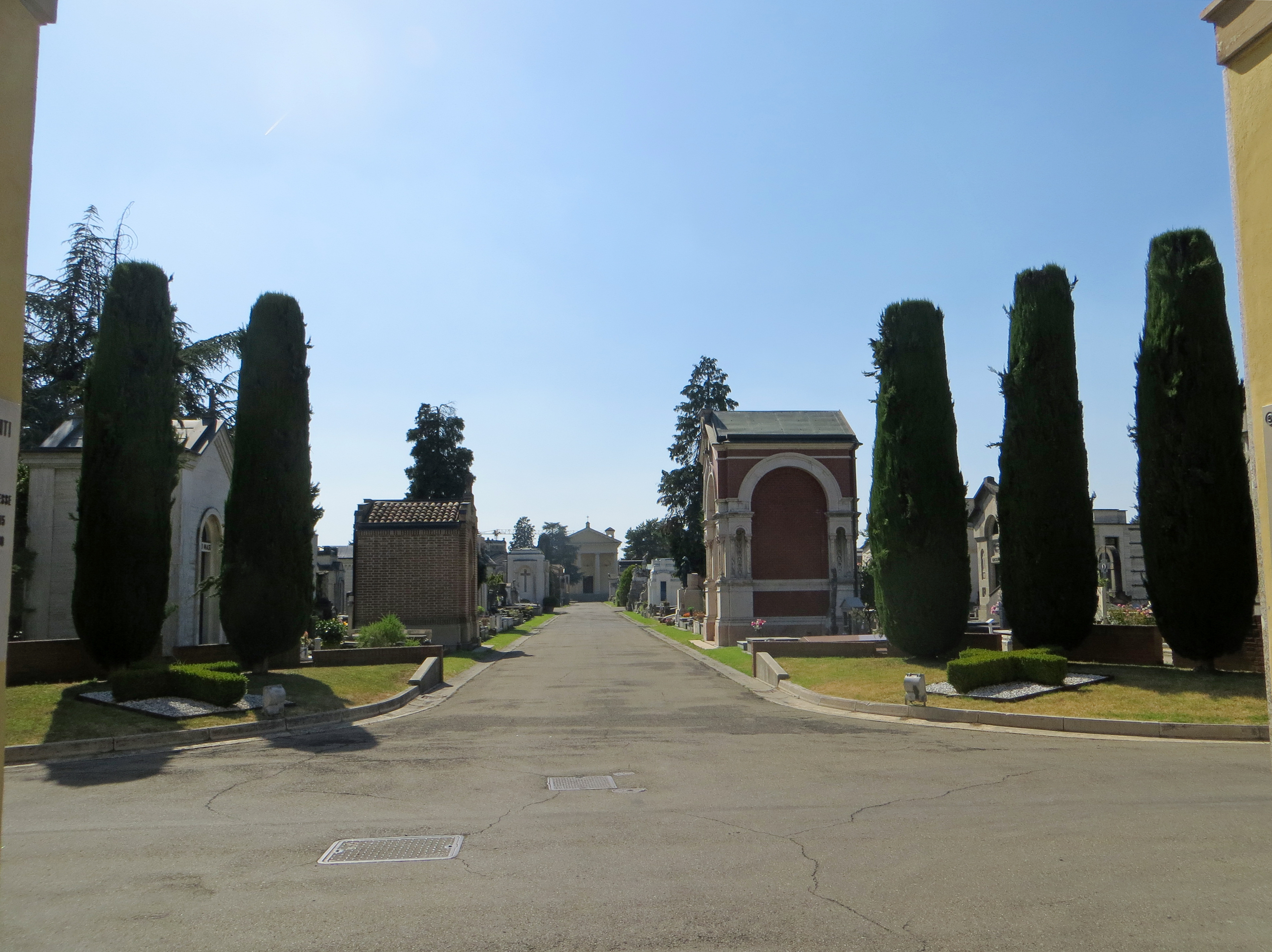 Cimitero della Villetta (Parma) - viale centrale